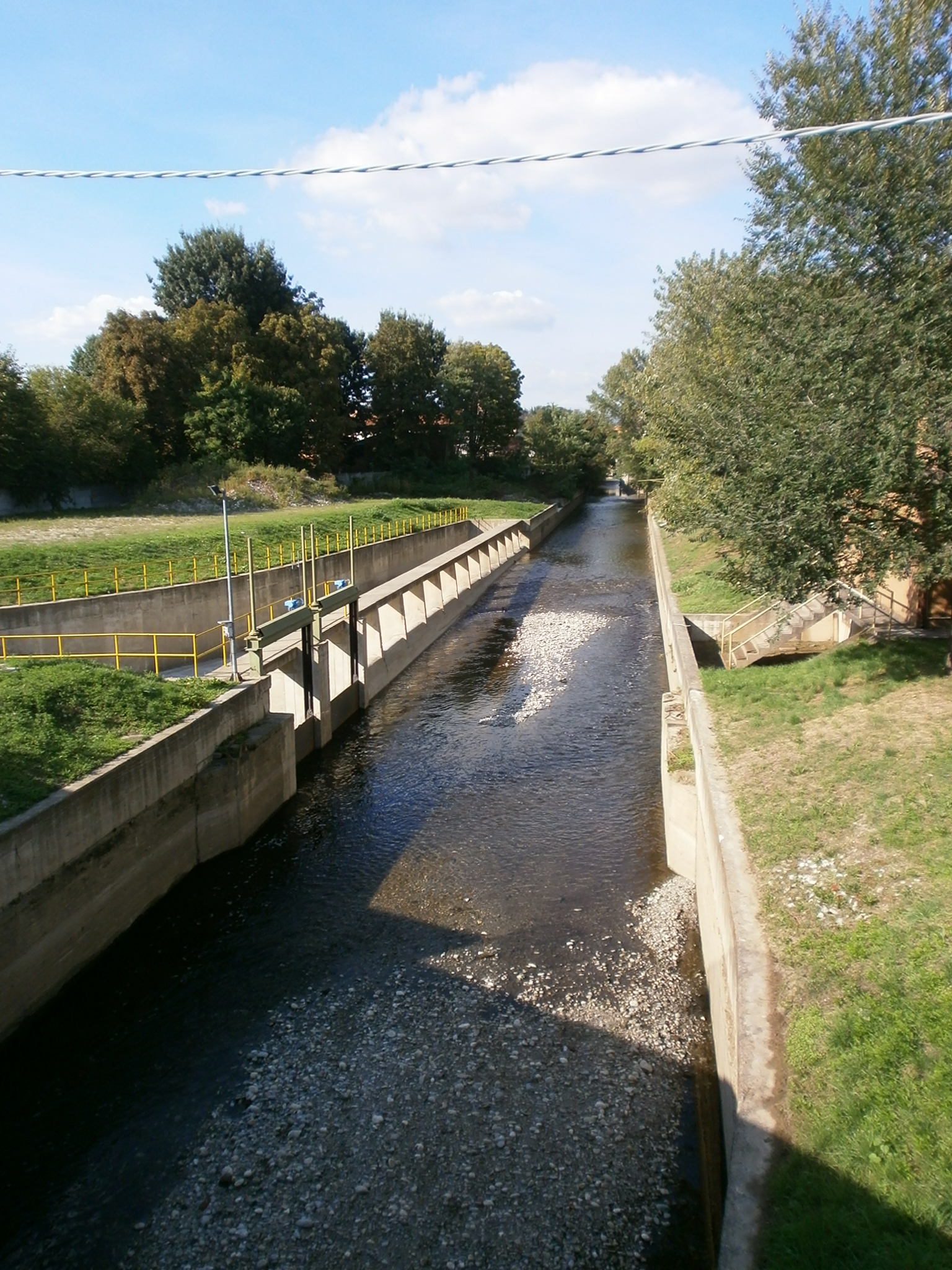 Scolmatore del seveso - palazzolo milanese - 01